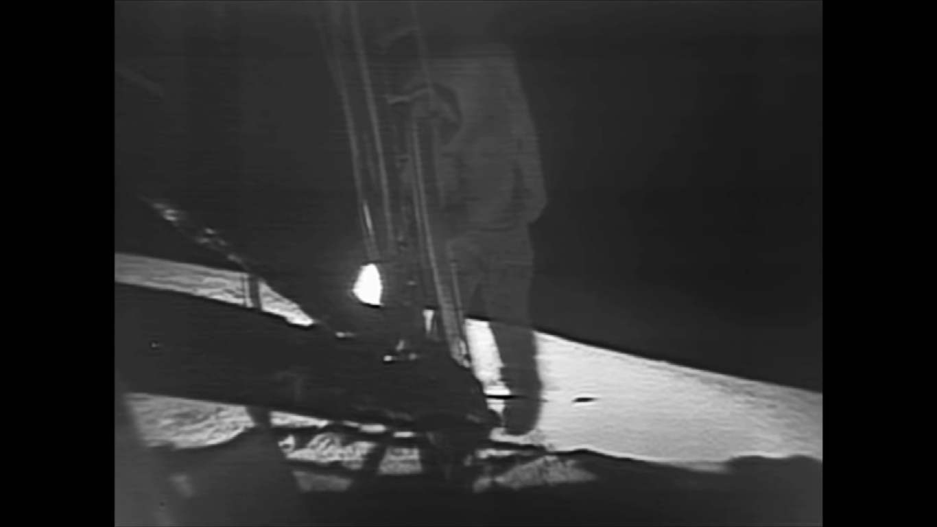 L'astronauta Buzz Aldrin mentre scende gli scalini del LEM